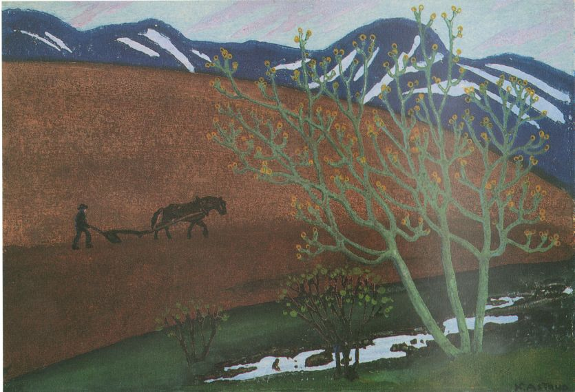 Fargetresnitt og håndkolorering på papir